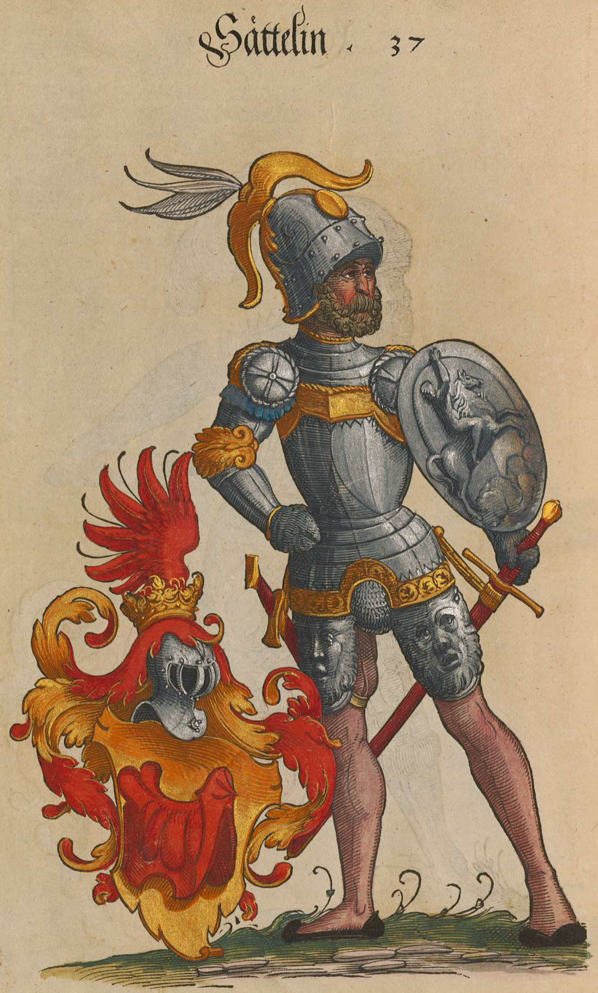 Wappen der Sättelin, Cod.icon. 312 b, Geschlechterbuch der Stadt Augsburg, Seite 51v